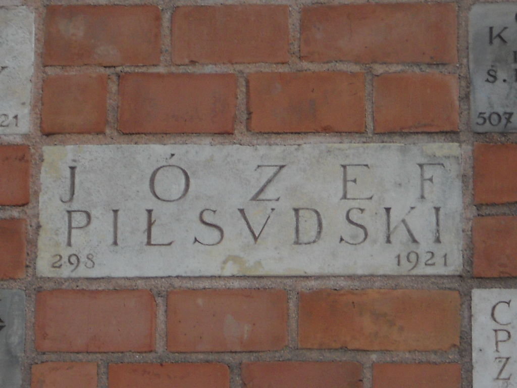 Cegiełka Józefa Piłsudskiego, za pomoc w odnowienie Zamku w 1921 roku, Wawel.